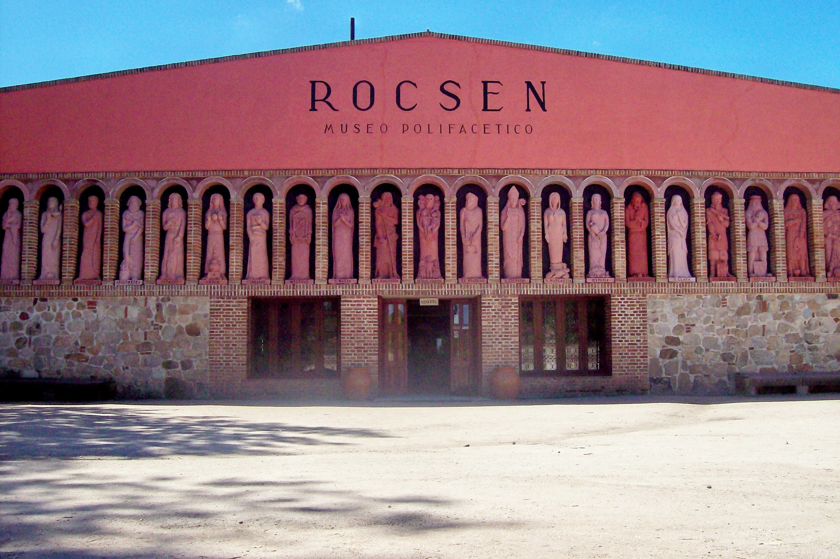 Rocsen (Museo Polifacético), en Nono, provincia de Córdoba, Argentina